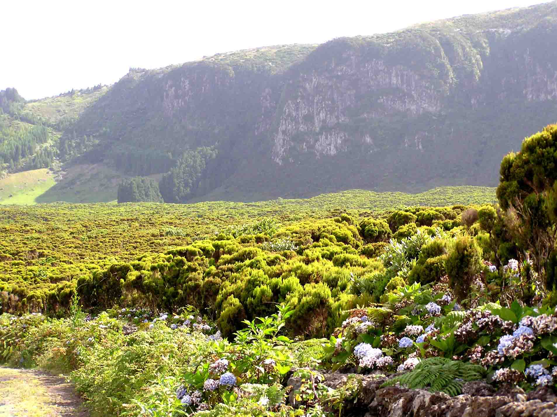 Caldeira Guilherme Moniz, Angra do Heroísmo, ilha Terceira, Açores, Portugal.